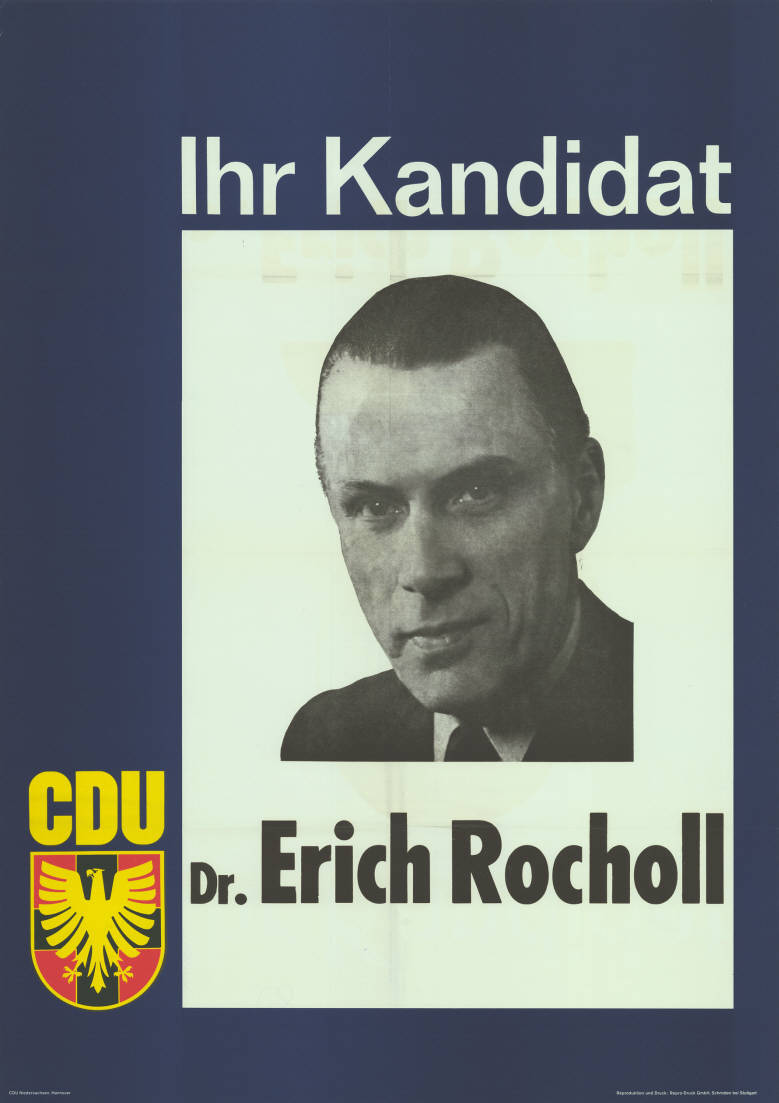 Ihr Kandidat CDU Dr. Erich Rocholl Abbildung: Porträtfoto Plakatart: Kandidaten-/Personenplakat mit Porträt Auftraggeber: CDU Niedersachsen, Hannover Drucker_Druckart_Druckort: Repro-Druck, Schmiden bei Stuttgart Objekt-Signatur: 10-008 : 220 Bestand: Landtagswahlplakate Niedersachsen (10-008) GliederungBestand10-18: Landtagswahlplakate Niedersachsen (10-008) » CDU Lizenz: KAS/ACDP 10-008 : 220 CC-BY-SA 3.0 DE